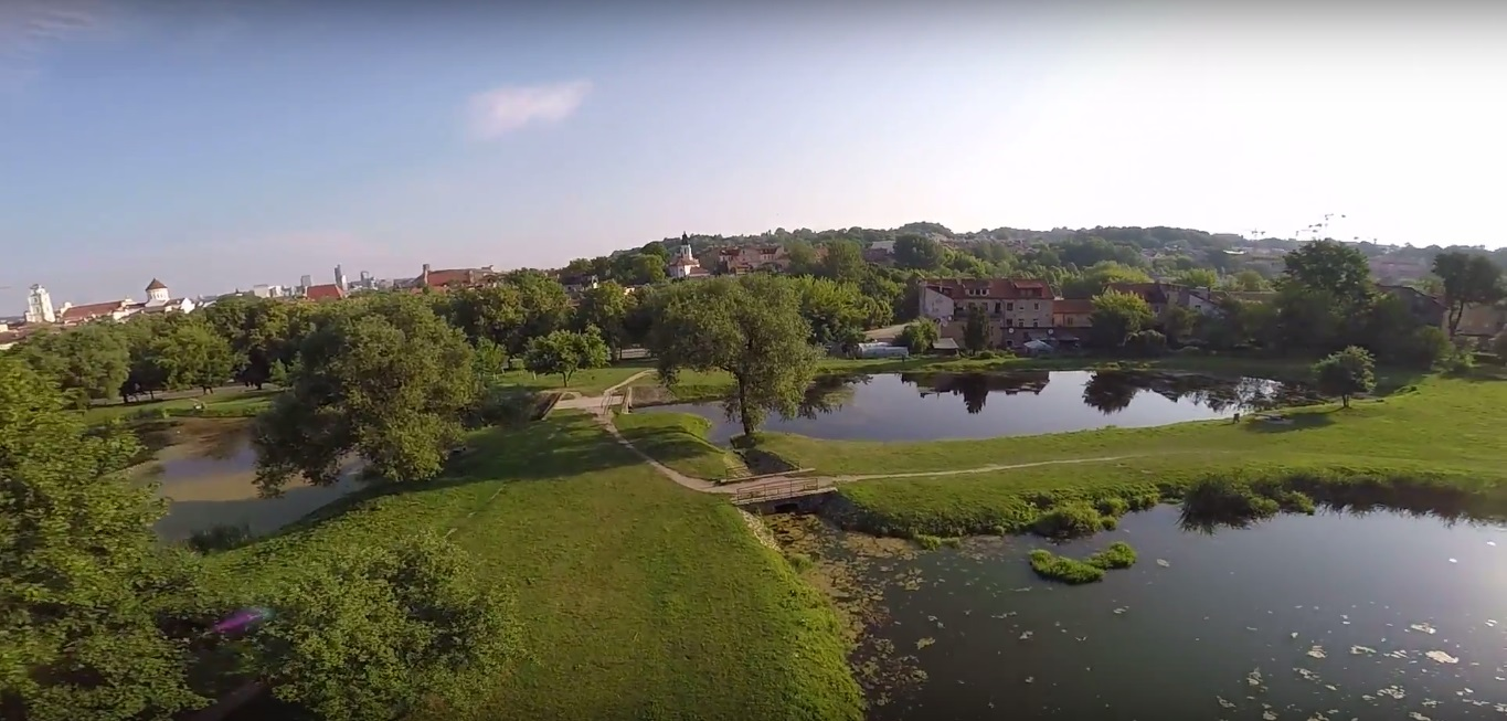 Misionierių sodai